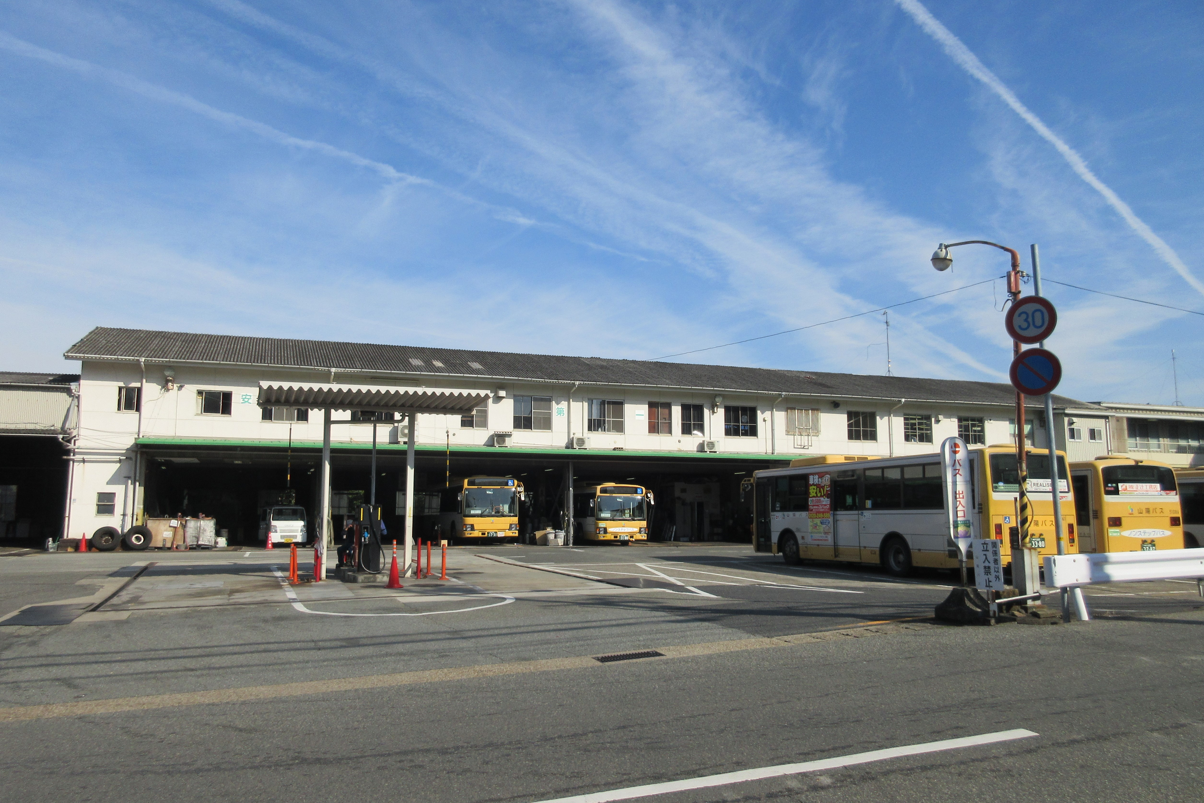 山陽バス本社